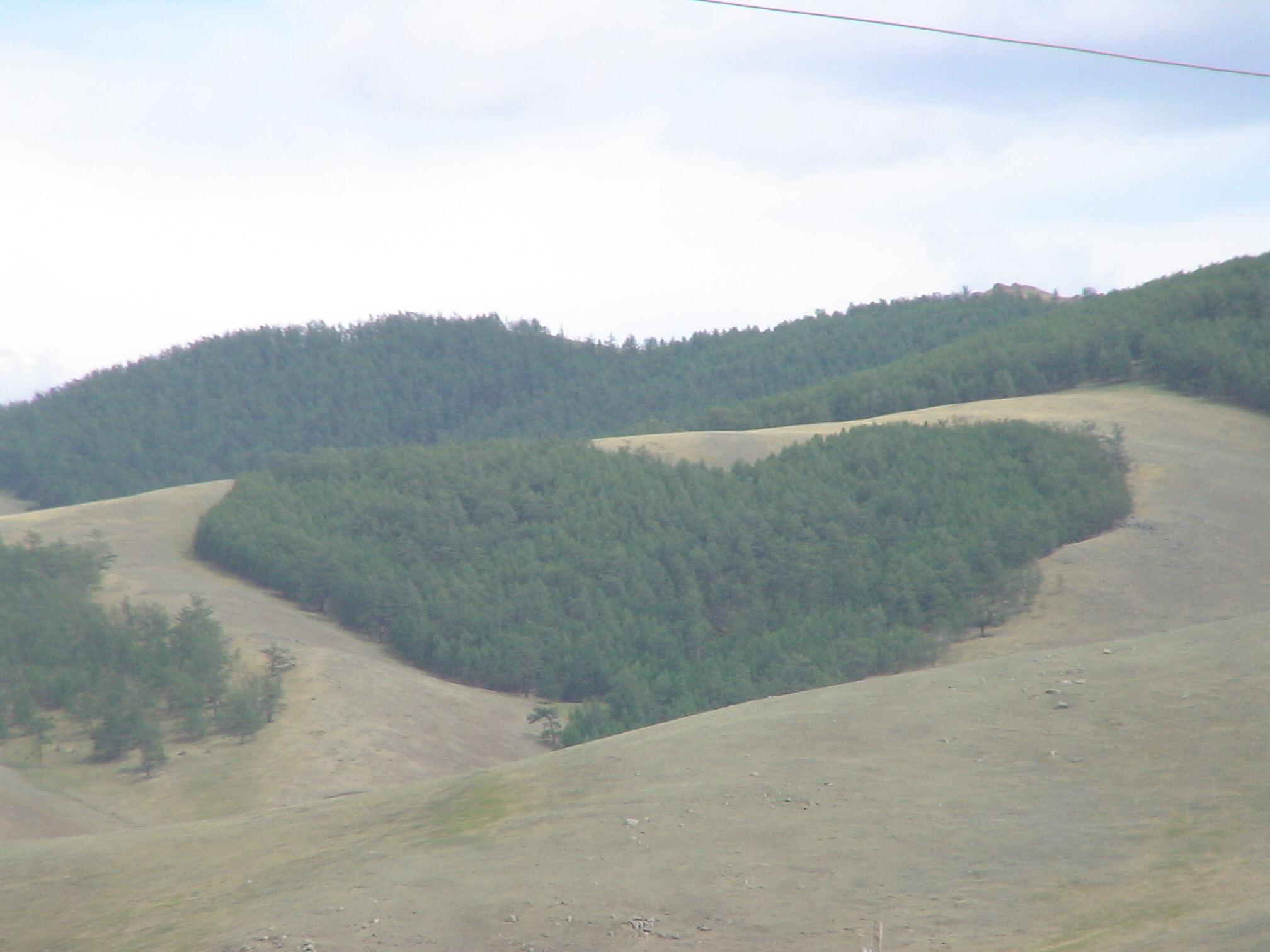 Монгол: Зүрхэн хэлбэртэй мод